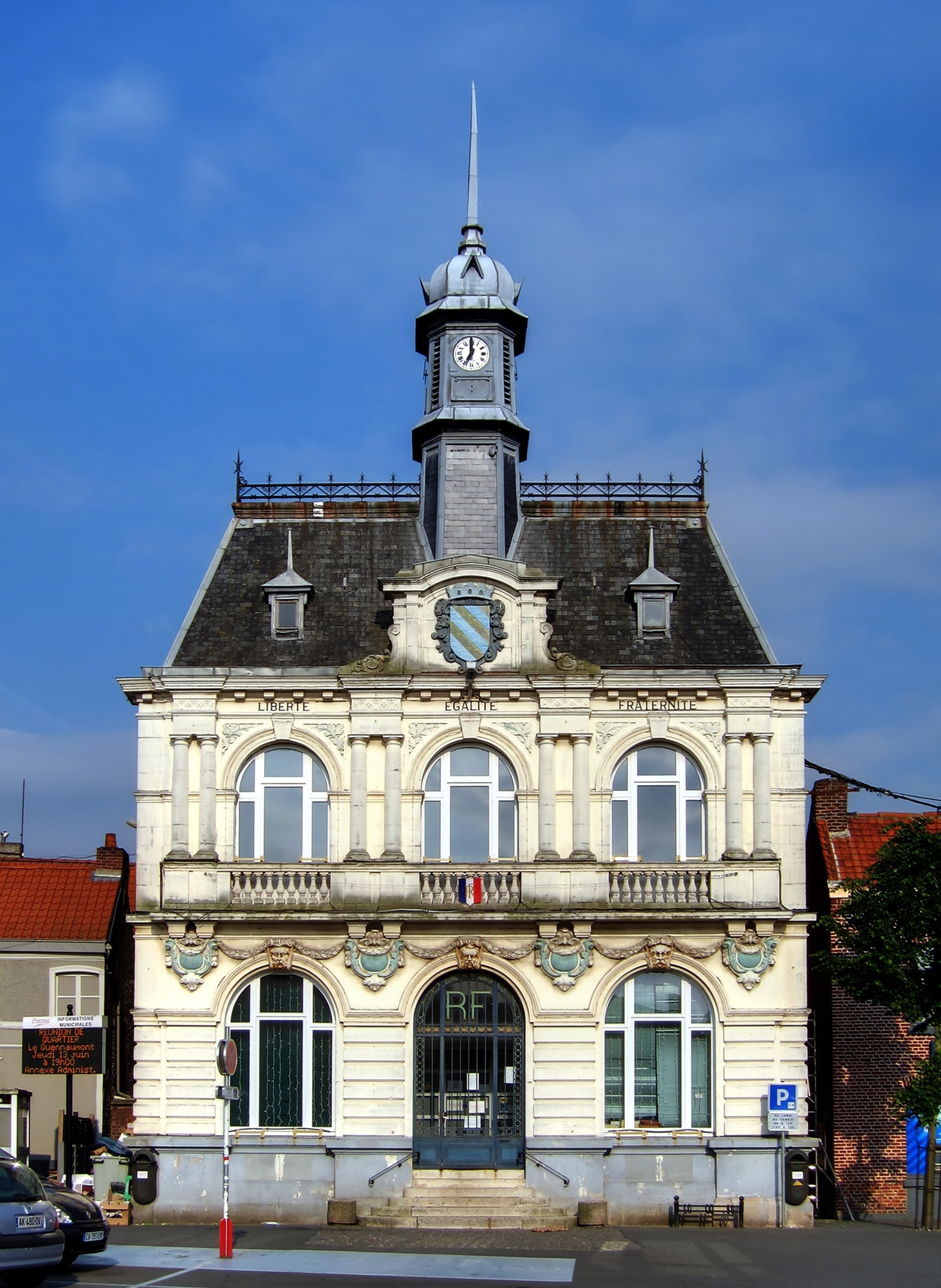 La mairie de Cysoing (Nord).